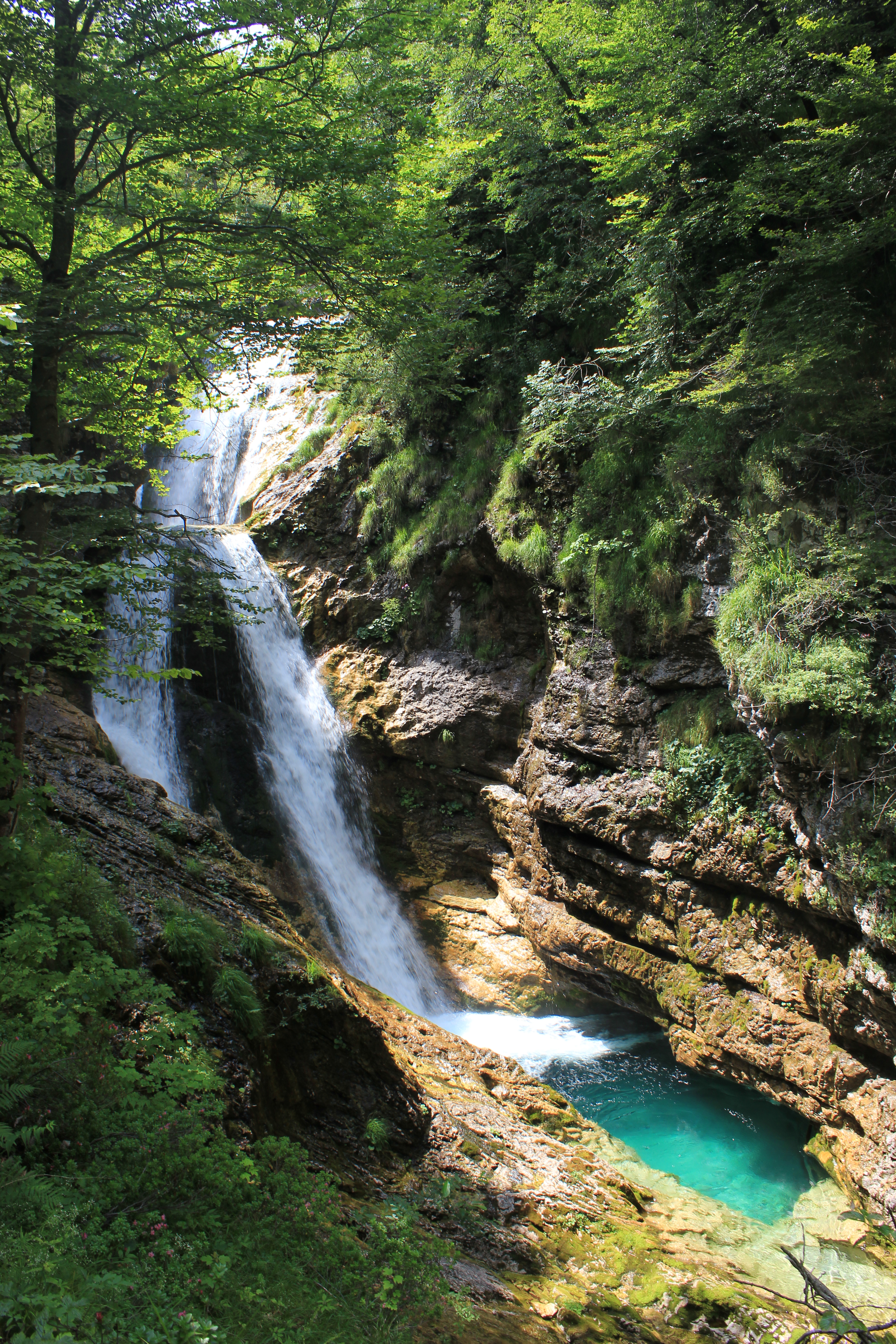 Le cascate del torrente Arzino in Val d'Arzino, provincia di Pordenone, Friuli - Venezia Giulia, Italy